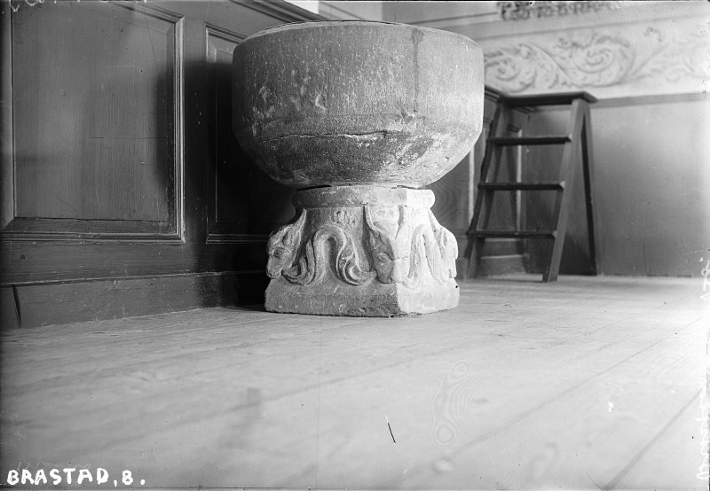 Dopfunt av sandsten, rund cuppa, enkel med skrånande botten. Fyrsidig fot med fyra behornade huvuden. Från 1200-talet. Snabbinv. Kategori: (04) DopfuntarDopfunt av sandsten, rund cuppa, enkel med skrånande botten. Fyrsidig fot med fyra behornade huvuden. Från 1200-talet. Snabbinv.